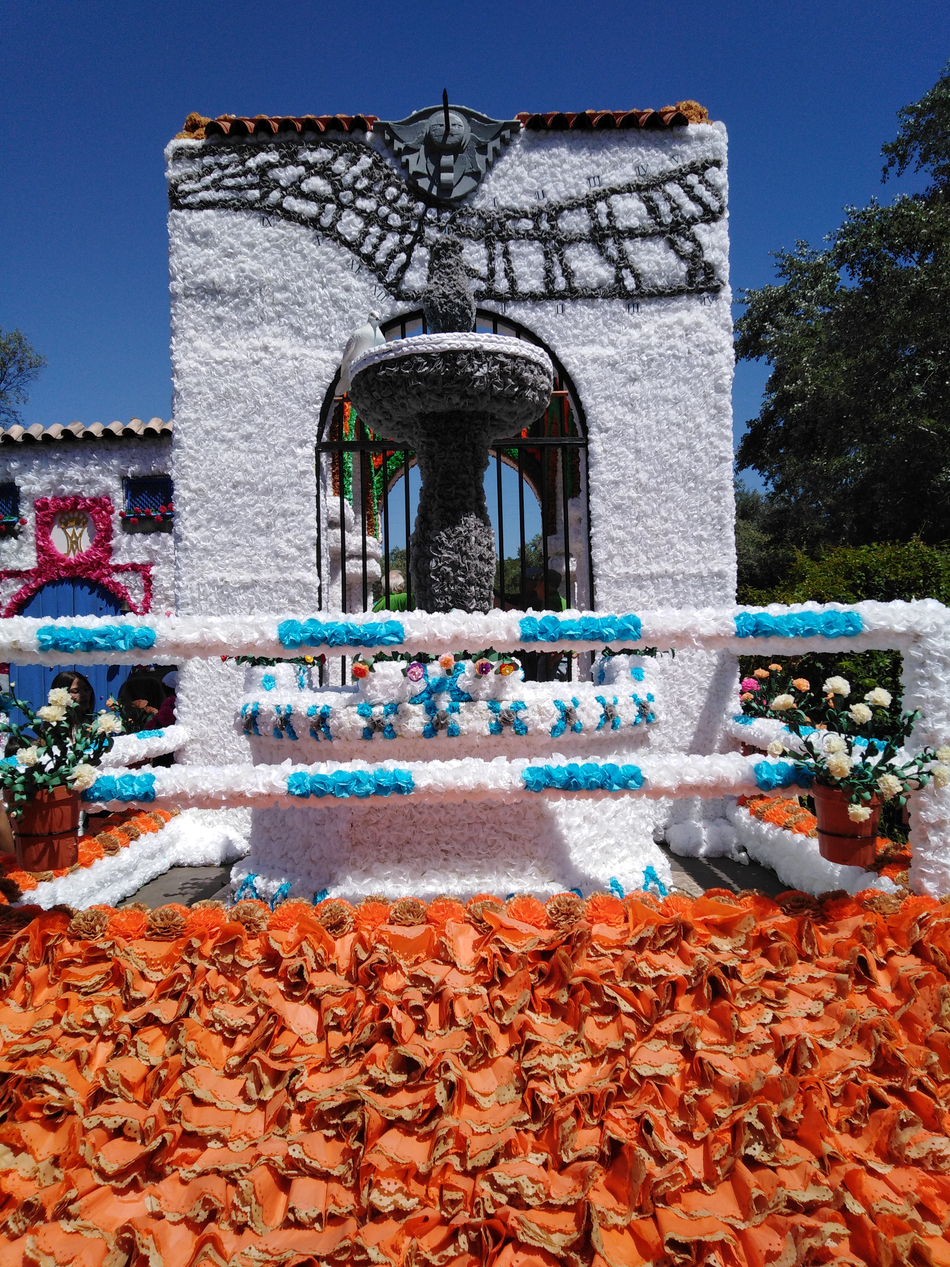 Esta es una de las carrozas decoradas por una de las asociaciones devotas de la Virgen de Nuestra Señora de Linares.